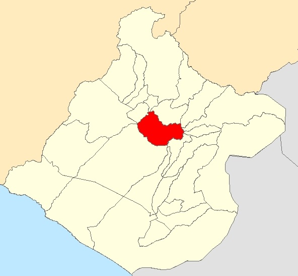 Mapa distrito Héroes Albarracín, Tacna - Perú